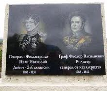 Паметна плоча в с. Гроздьово на генералите Иван Иванович Дибич и Фьодор Василиевич Ридигер, изиграли основна роля при овладяването на Кюпрюкьой (Гроздьово) по време на Руско-турската война 1828-1829 г.